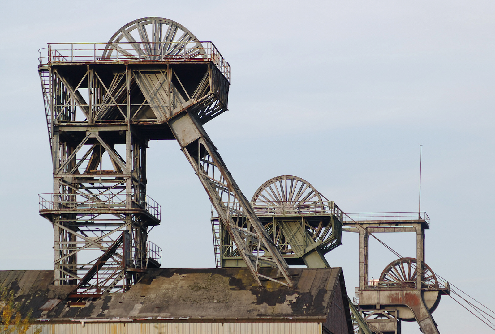 Seilscheiben der drei Schächte der Zeche Radbod in Hamm/Westfalen